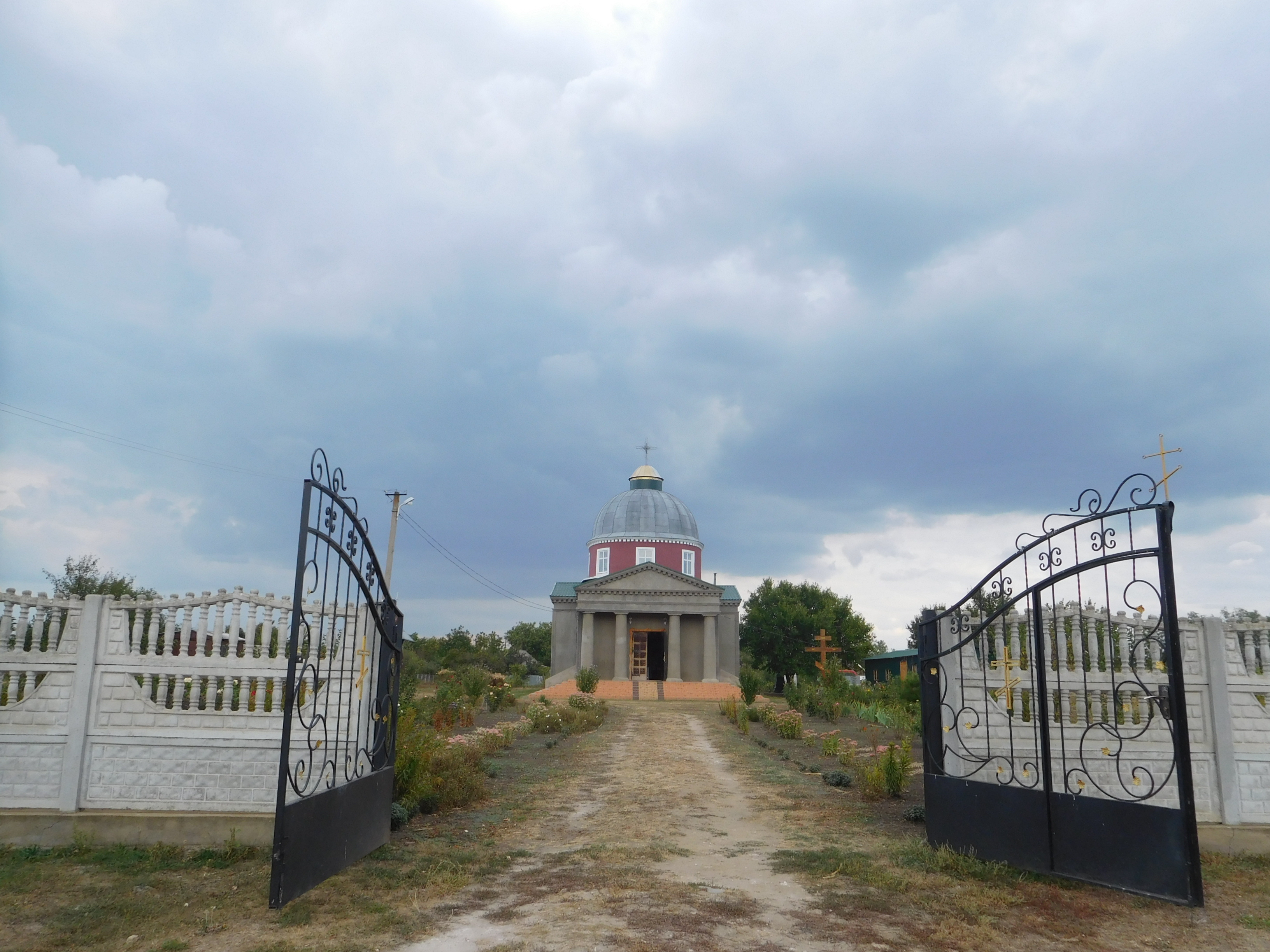 Храм Святої Преподобної Мучениці Анастасії Римлянки (Новопетрівка, Великомихайлівський район) - 1896 рік. Вікіекспедиція Північ Одещини